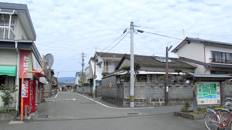 くま川鉄道湯前線ja:相良藩願成寺駅 駅周辺 駅前広場から北側を見る。 写真手前の道を右に進むとja:国道445号に突き当たる。 撮影者/著者/著作権保有者 : MK Products (本人がアップロード) 撮影日 : 2007/03/14 相良藩願成寺駅用にアップロードした画像です。良い画像があれば別の画像に変えてください。 Category:鉄道駅前画像 Category:人吉市の画像